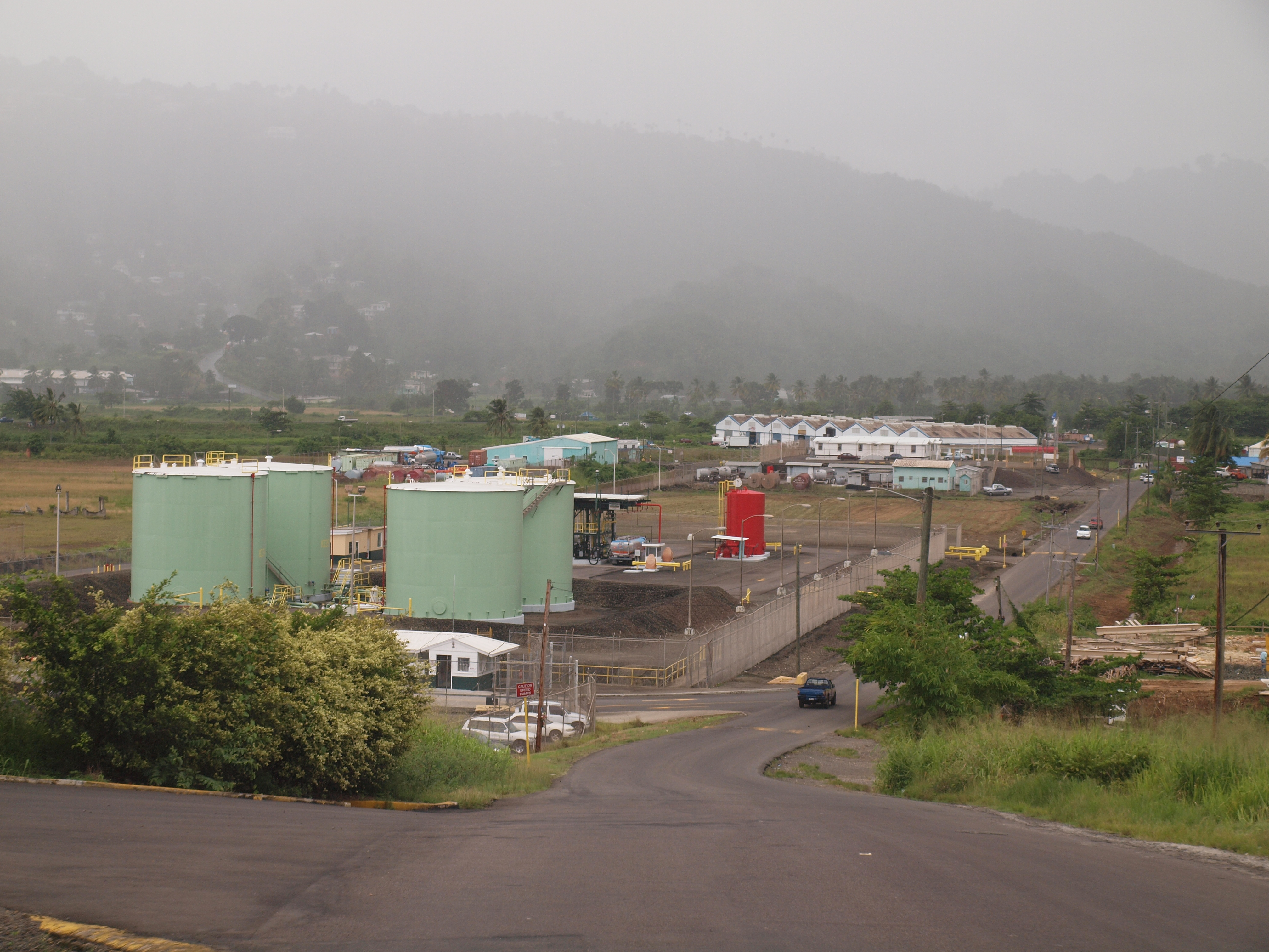 Cul de Sac Valley, Saint Lucia